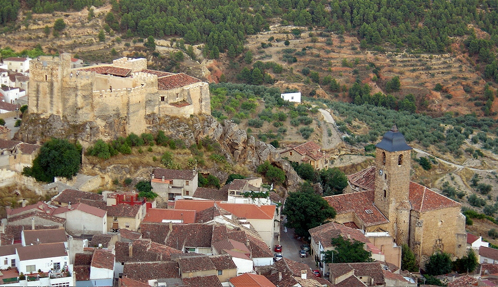 Vista de Yeste: Castillo e Iglesia de la Asunción. Imagen tomada por mí en 2004.